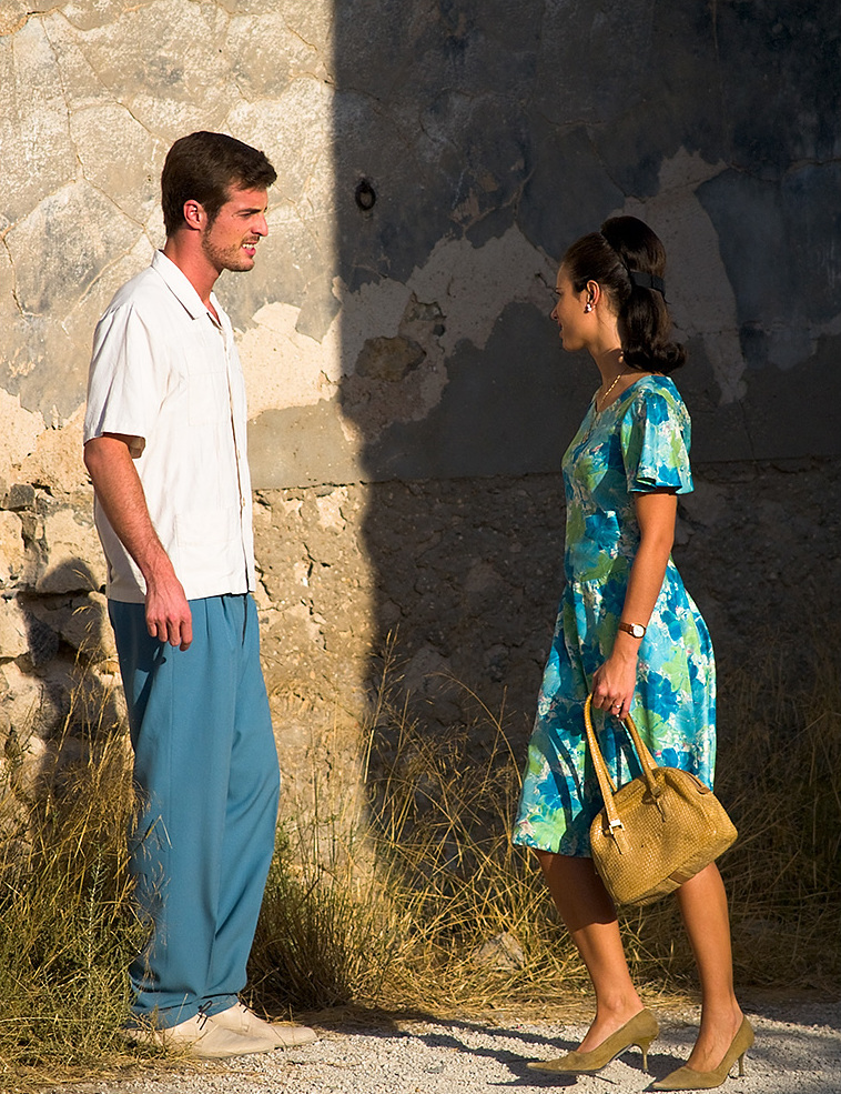 Un moment en el rodatge de la sèrie valenciana per a Canal 9 - RTVV "L'Alqueria Blanca" amb els dos protagosnistes Jaume (Miguel Barberá) i Assun (Nani Jiménez).